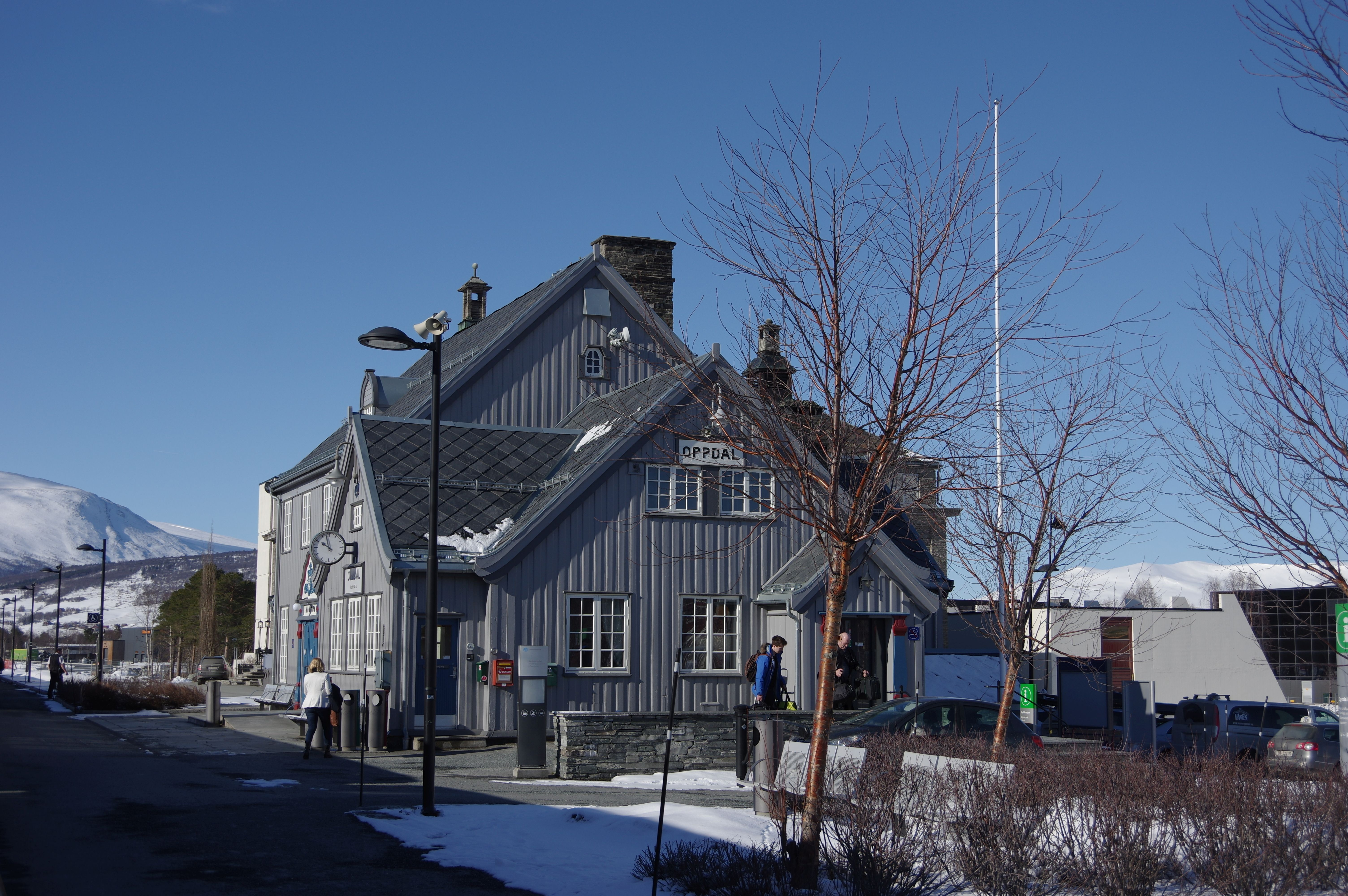 Oppdal in Norwegen. Der Bahnhof des Ortes liegt an der Dovrebahn.